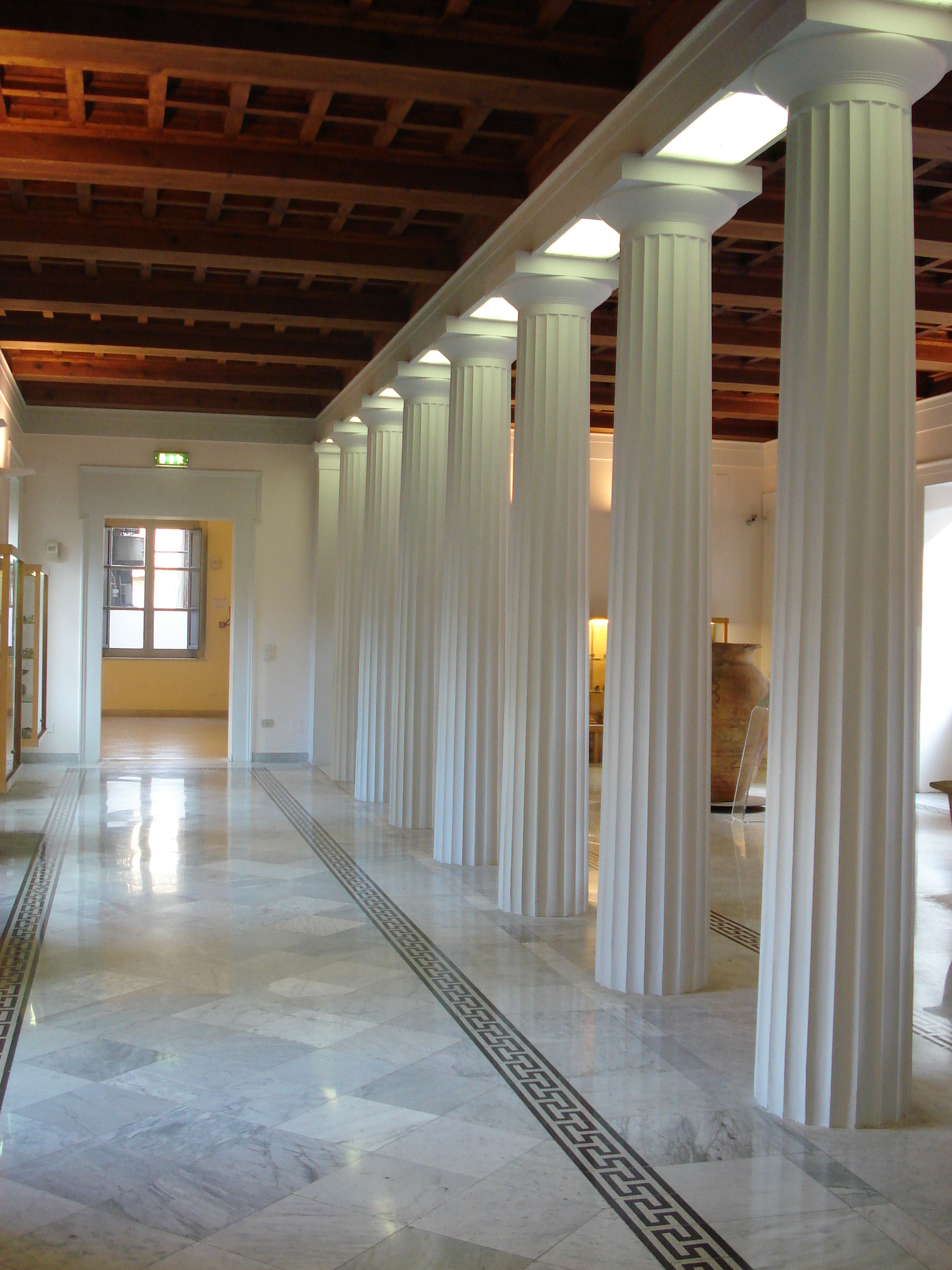 La sala delle colonne del Museo archeologico regionale di Palermo, 28 settembre 2006. Foto di Giovanni Dall'Orto.